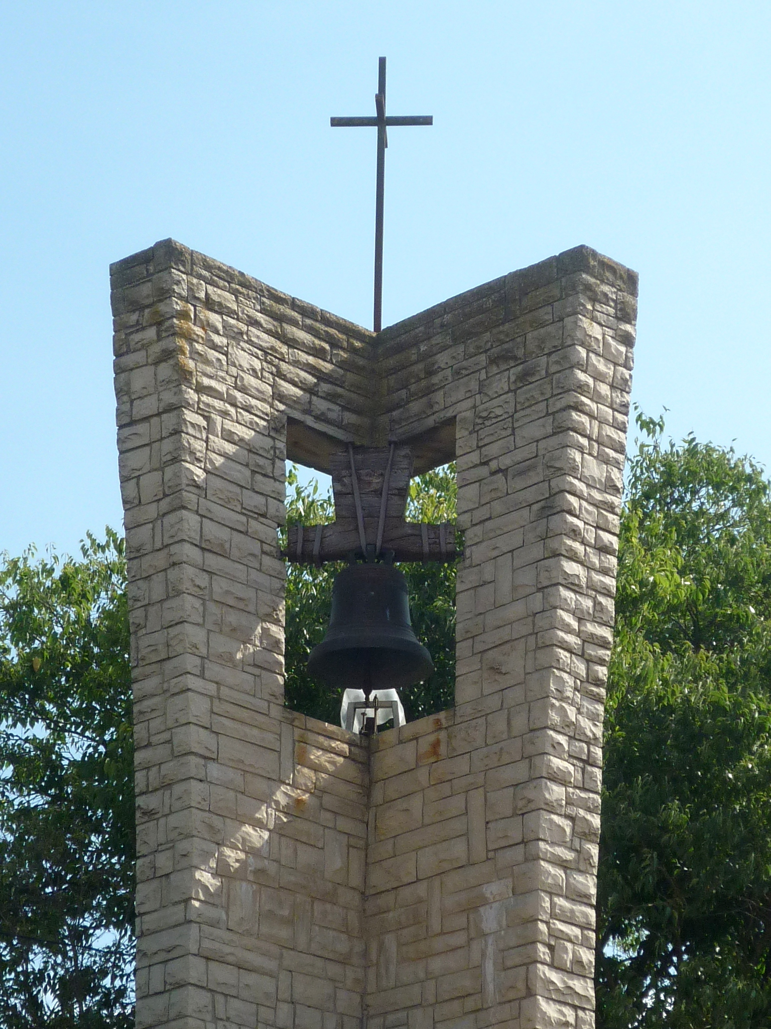 Nova església parroquial de Santa Maria de Gàver (Estaràs): campanar